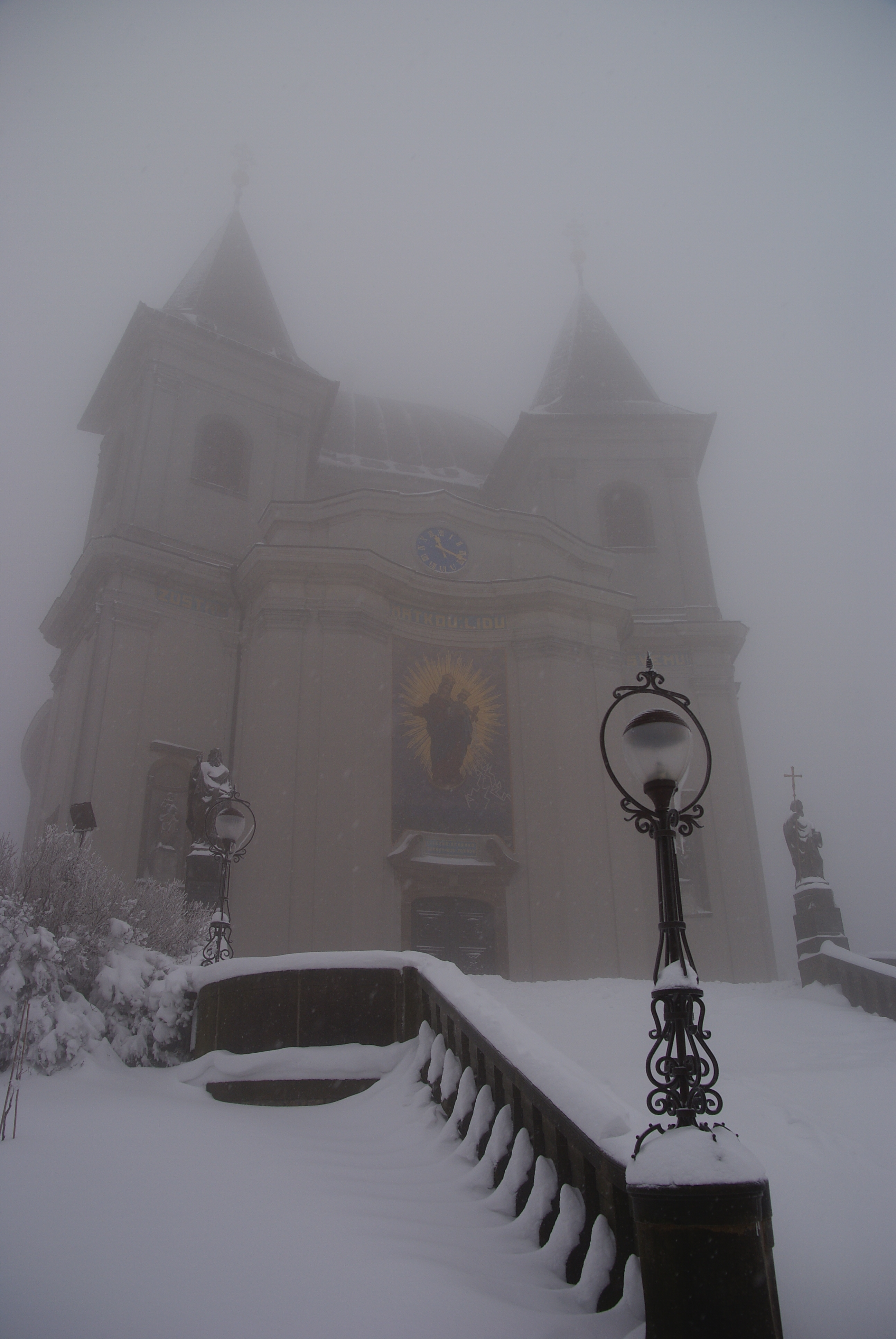 Kostel Nanebevzetí P. Marie na Sv. Hostýně (Chvalčov), Hostýn, Chvalčov